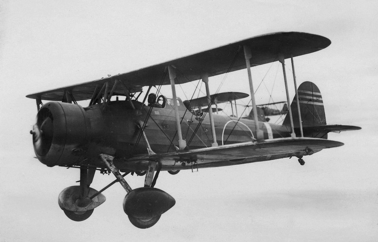 96式艦上爆撃機